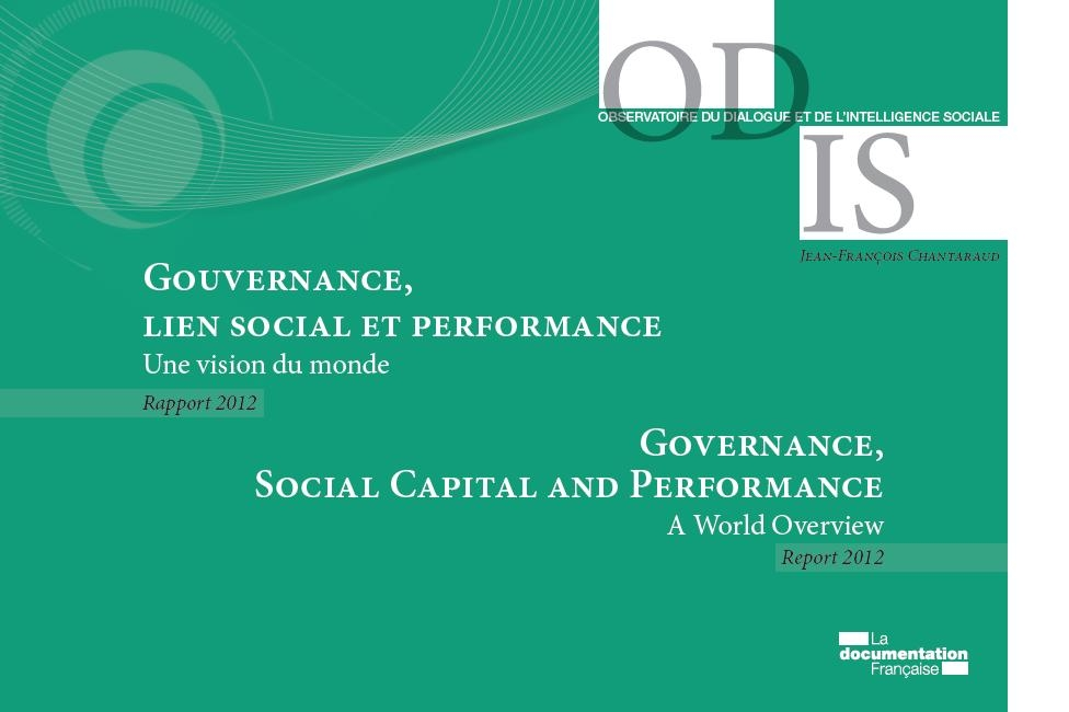 Rapport monde 2012